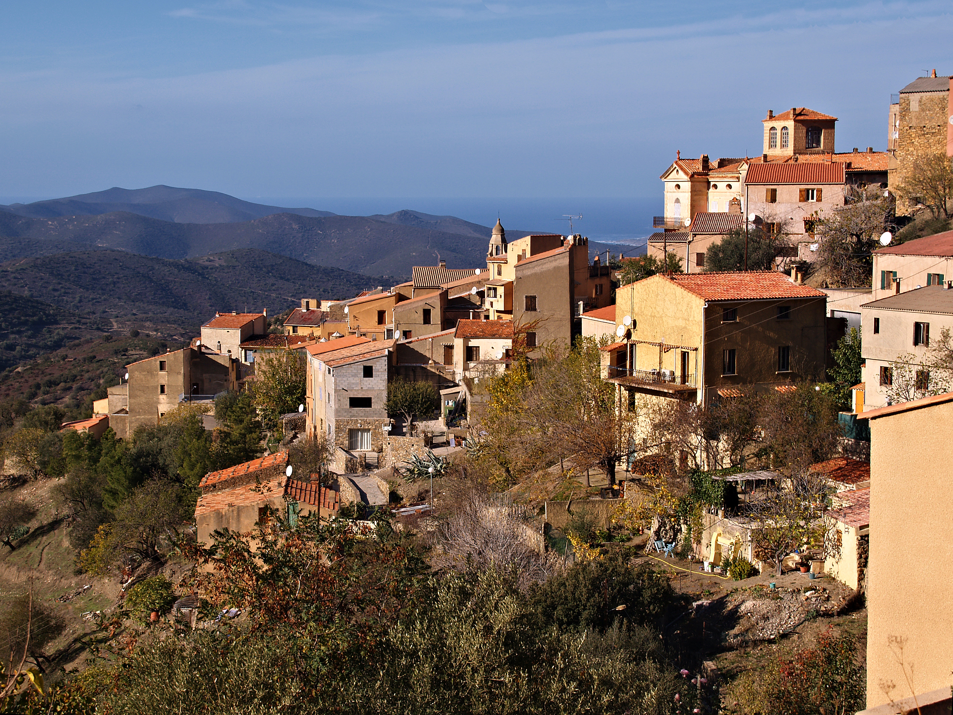 Novella - Le village